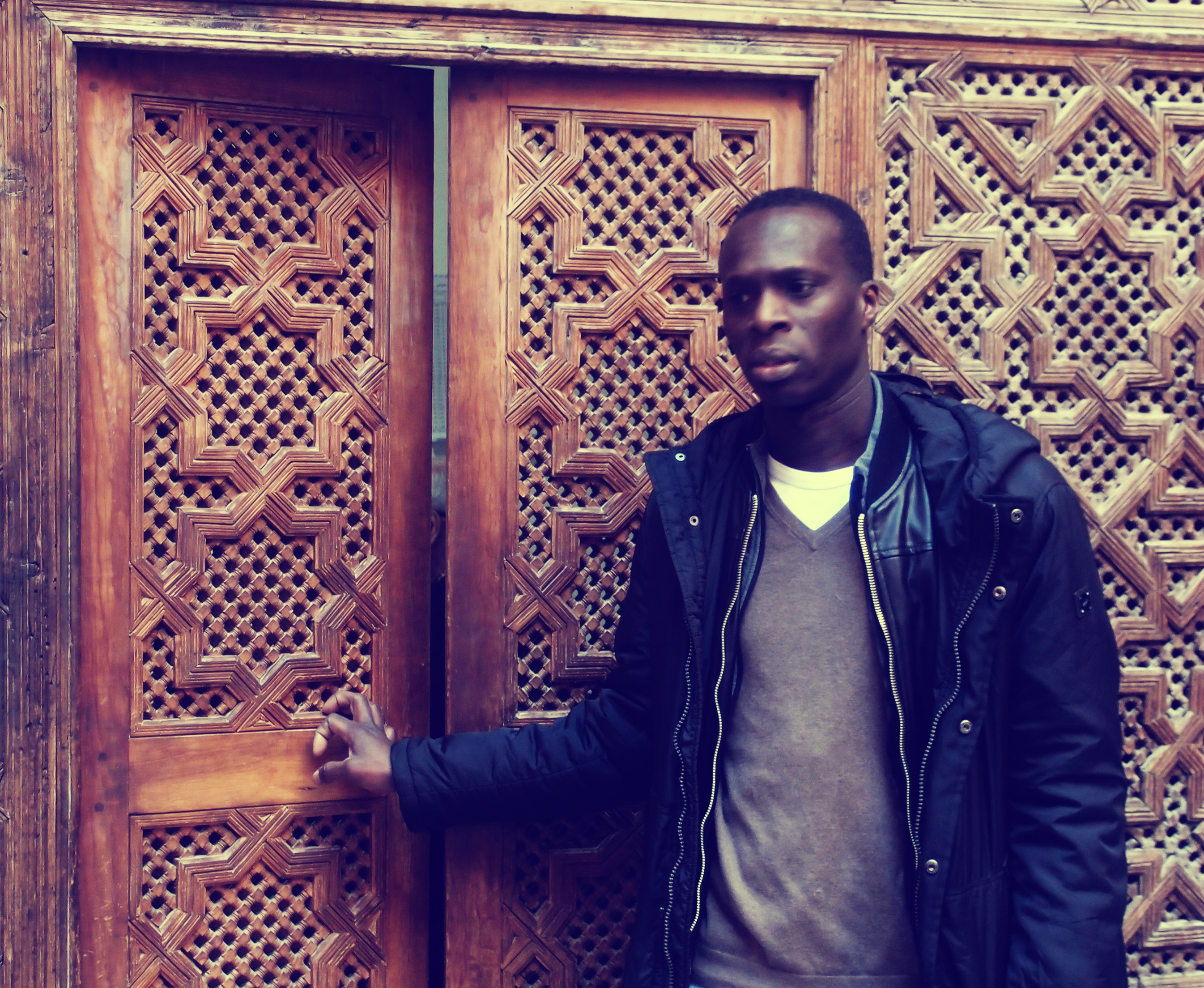 Modou Gaye, Université Al-Qarawiyyîn, Fes, 2016